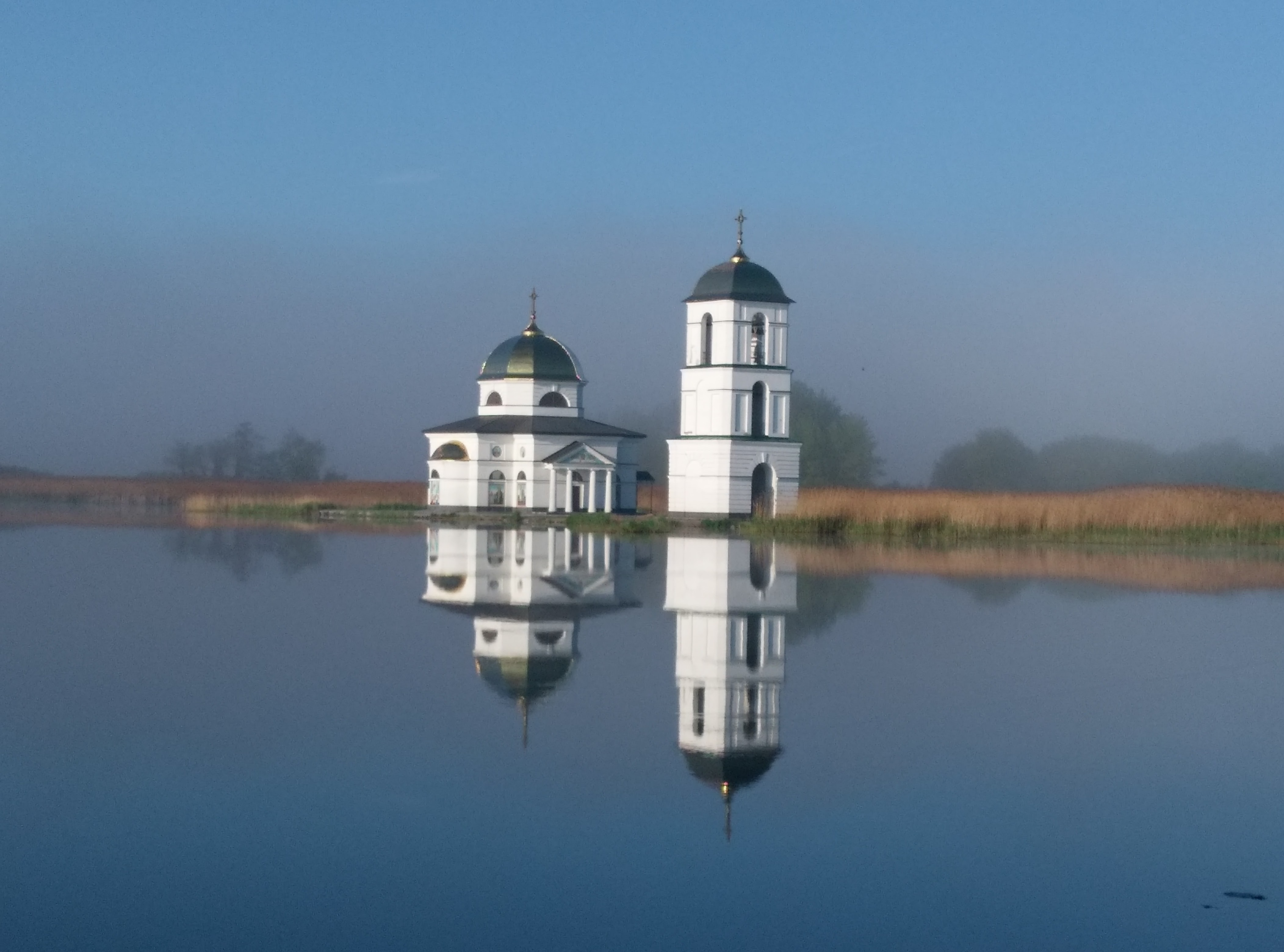 St. Transfiguration Сhurch (Kyiv Oblast)